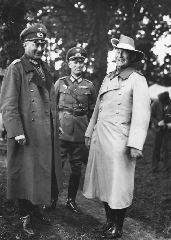 Herbstmanöver bei Celle Zentralbild Paul von Lettow-Vorbeck Preußischer Generalmajor. geb.: 20.3.1870 in Saarlouis; war von 1913 bis 1918 Kommandeur der Schutztruppen in Deutsch-Ostafrika. UBz: von Lettow-Vorbeck (rechts) als Manövergast bei den großen Truppenmanövern bei Celle 1935 mit dem Befehlshaber des Wehrkreises VI Generalleutnant von Kluge. 29481-35 [Großes Herbstmanöver des 6. Armeekorps in der Lüneburger Heide 2. bis zum 7. September 1935] Abgebildete Personen: Lettow-Vorbeck, Paul von: General der Schutztruppen in Deutsch-Ostafrika, Deutschland Kluge, Günther von: Generalfeldmarschall, Ritterkreuz (RK), Heer, Deutschland (GND 124447775)